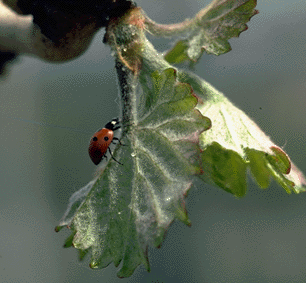 Marienkäfer auf jungen Rebentrieb.